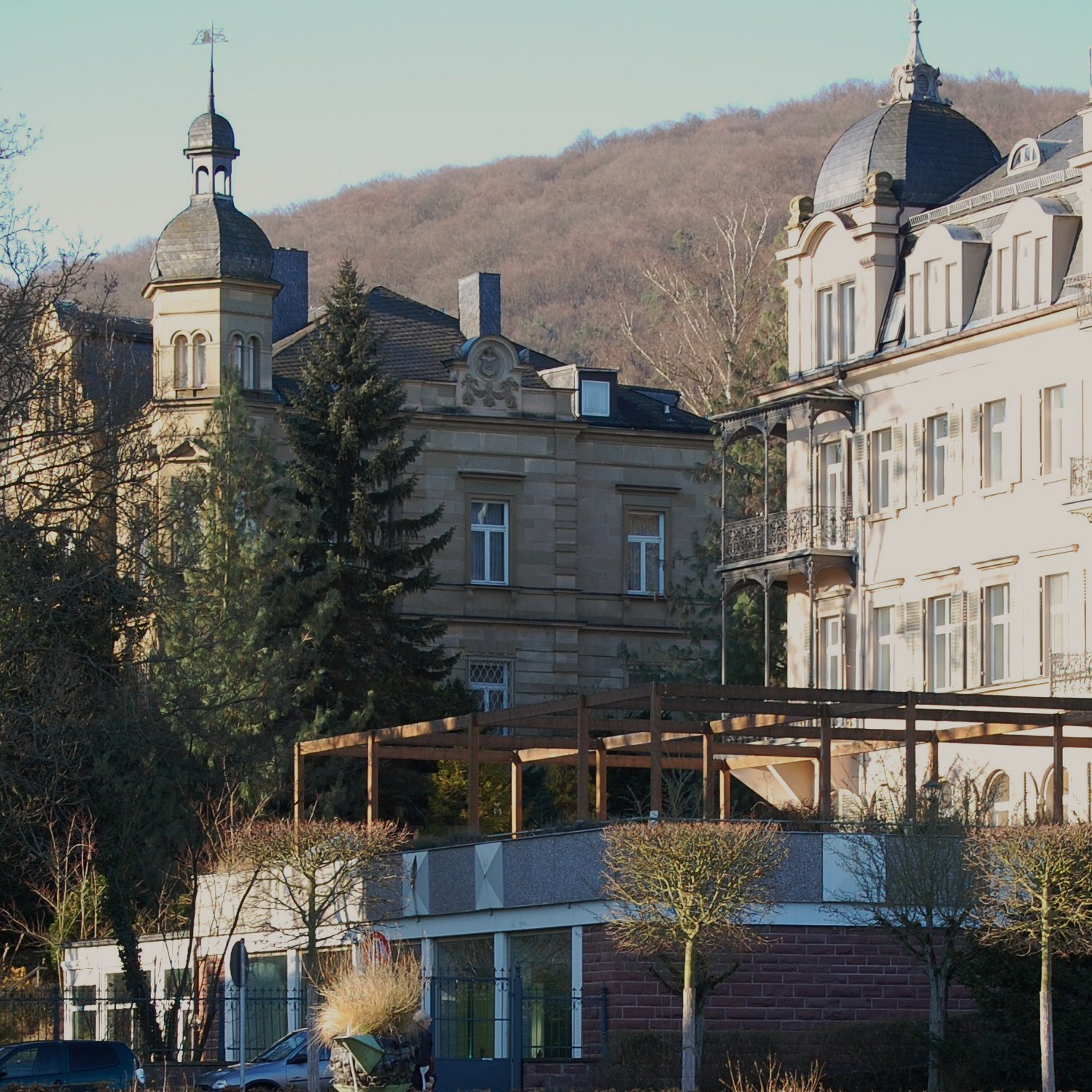 Die Villa Gordon (links) und das Sanatorium Fürstenhof in Bad Kissingen